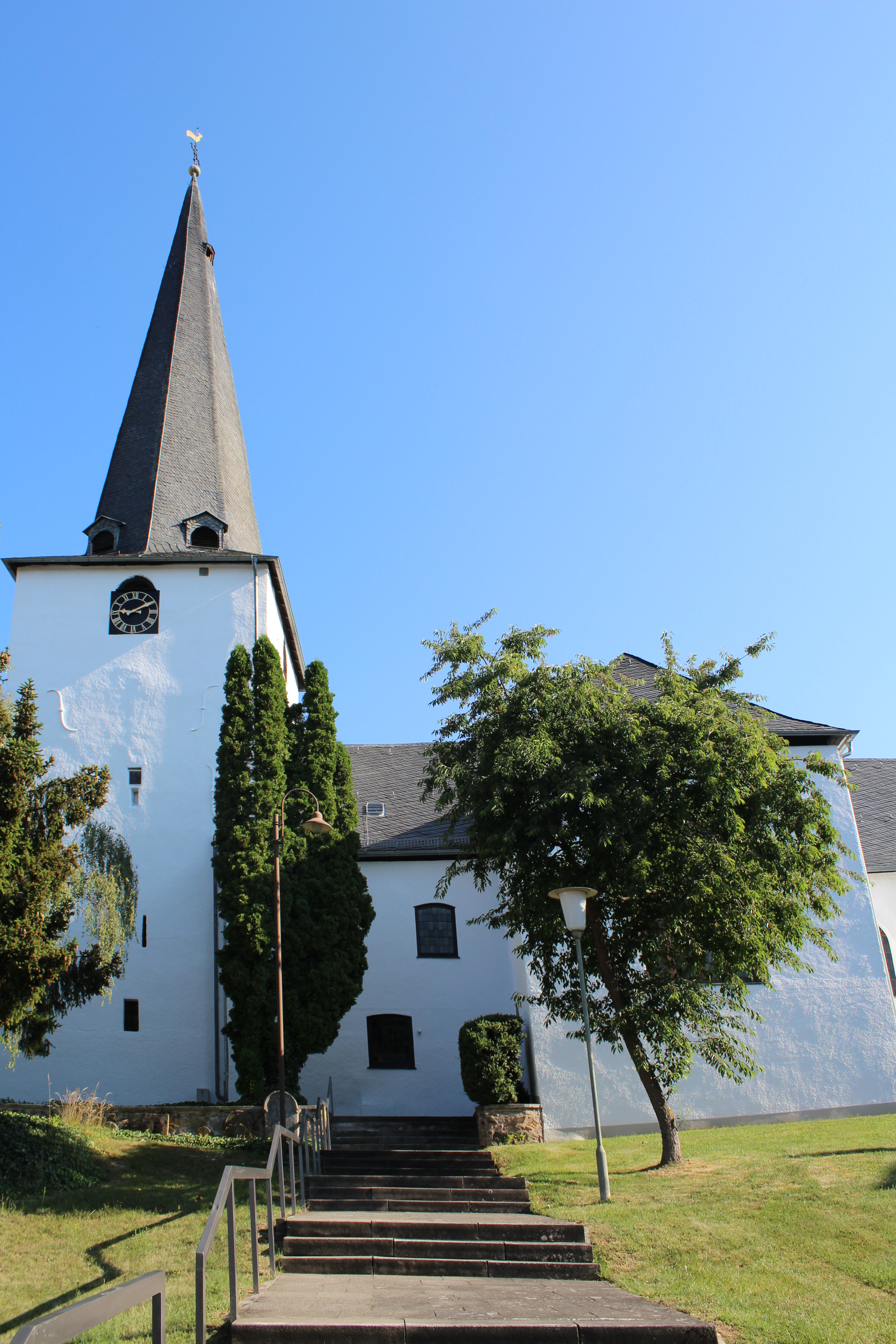 Evangelische Kirche Leun, Lahn-Dill-Kreis, Hessen, Deutschland